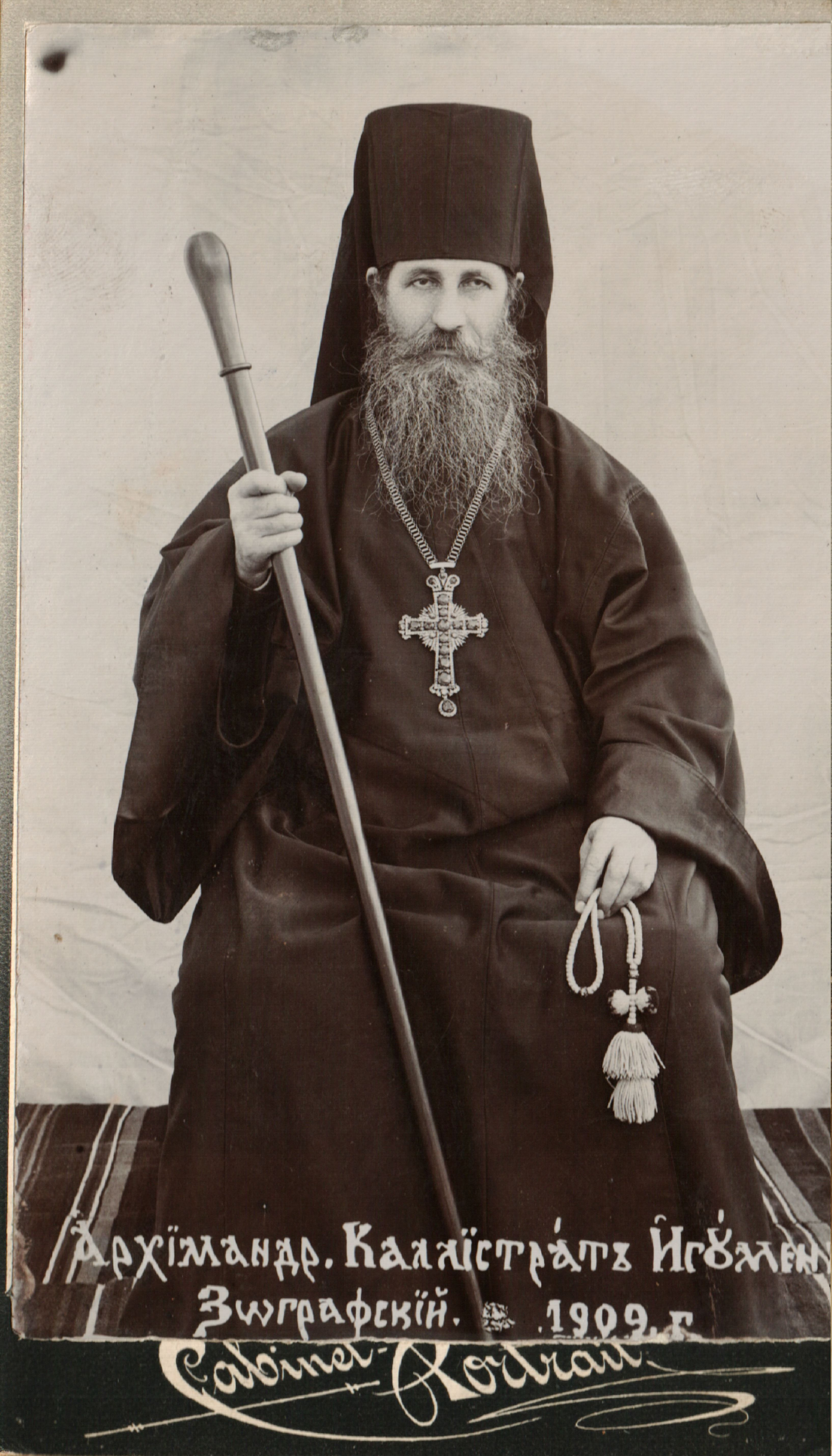 Снимка на архимандрит Калистрат, игумен на Зографския манастир